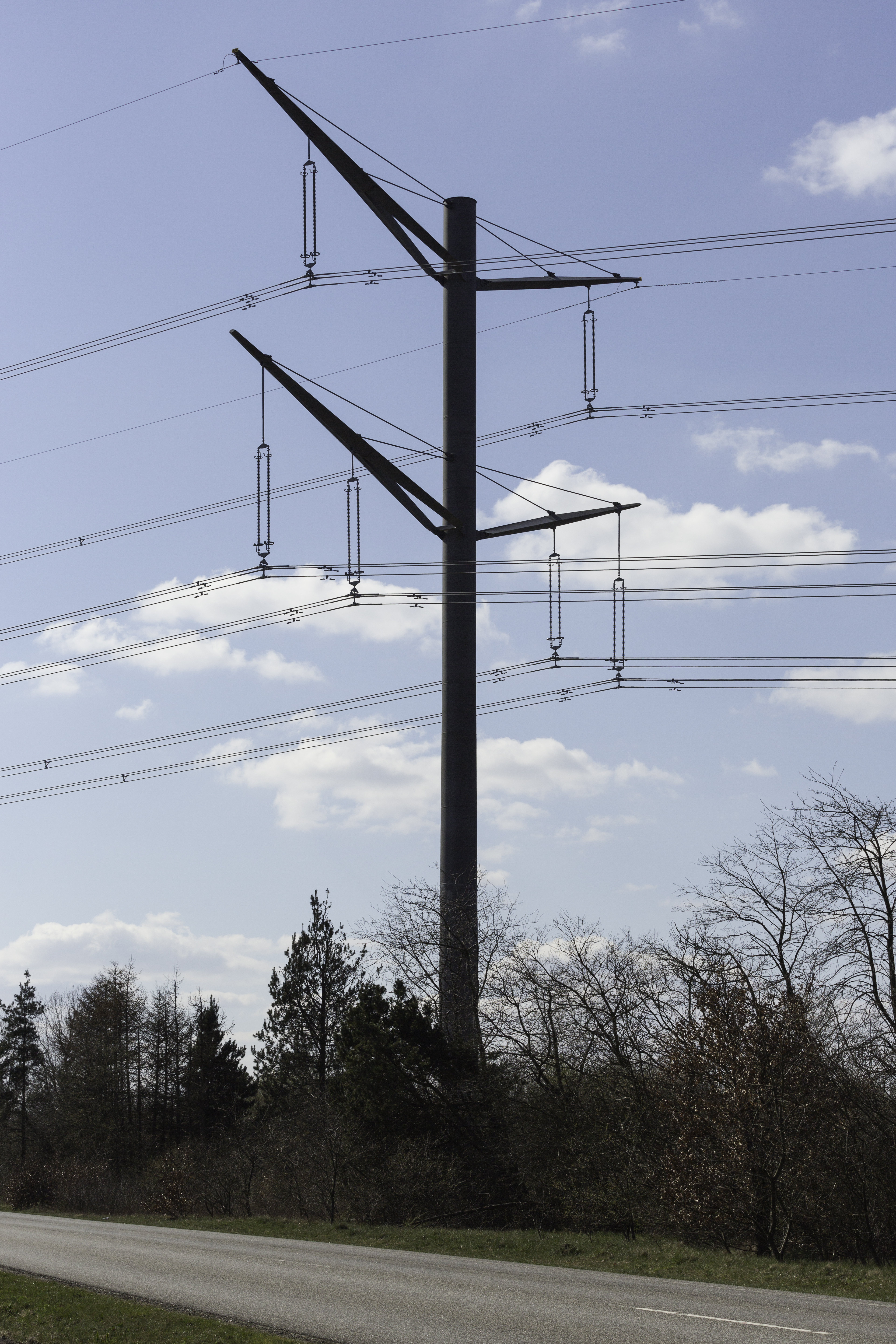 Højspændingsforbindelsen Kassø–Tjele på vejen mellem Ejstrupholm og Brande